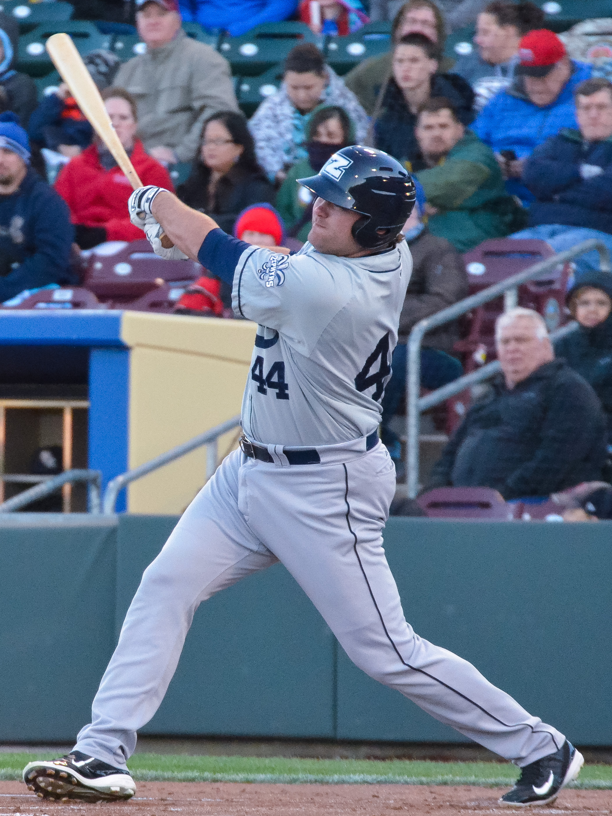 Dan Black